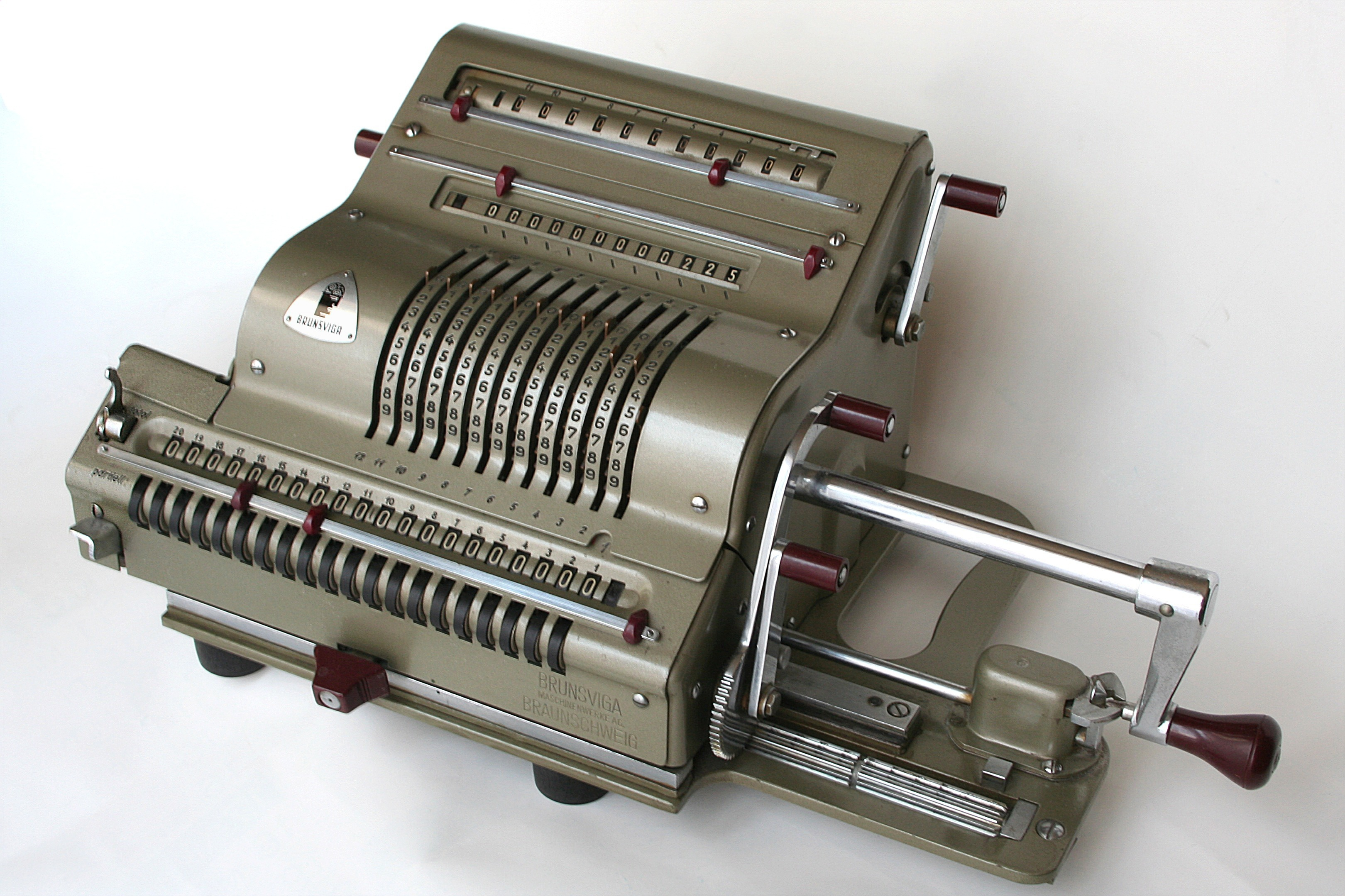 Handbetriebener 4-Spezies-Rechner „Brunsviga 20“ aus den 1950-1960er-Jahren. Bauzeit laut Rechnerlexikon 1934 bis 1963, Preis 1956: 975,00 DM